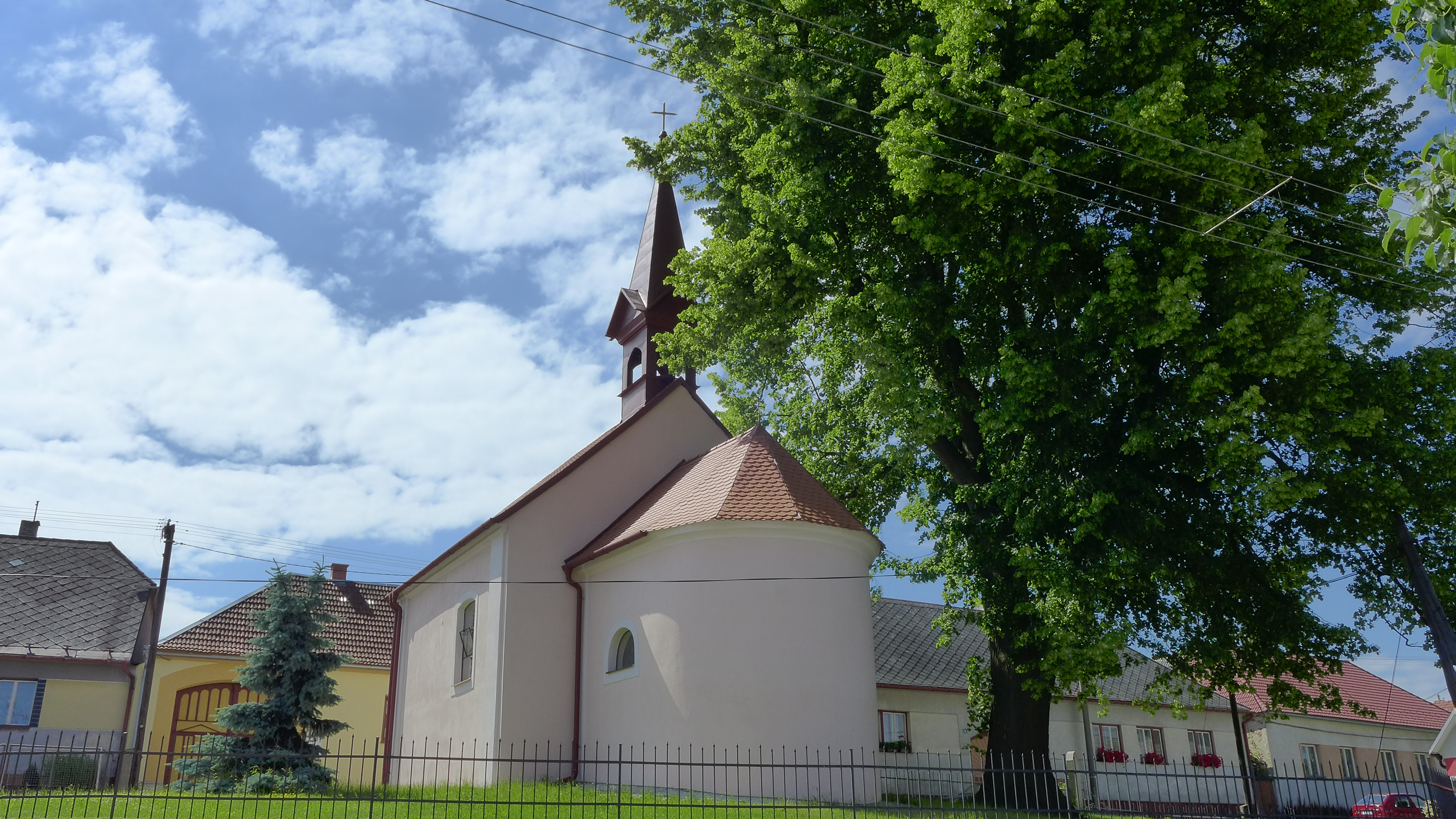 Kaple Panny Marie, na návsi